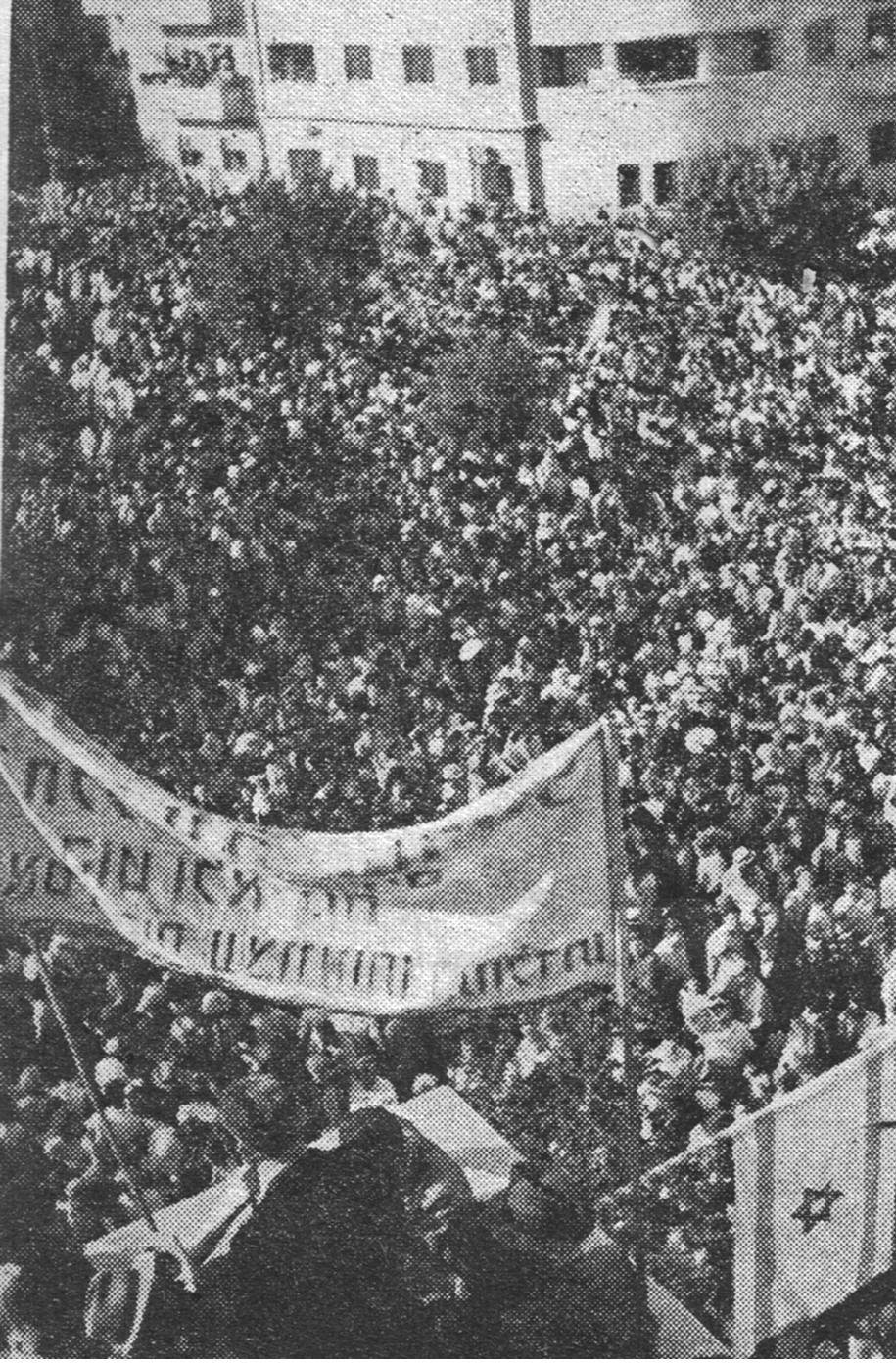 יצחק בן צבי נואם בפני ההמון שהתכנס ליד בניין המוסדות הלאומיים ברח' המלך ג'ורג' בירושלים ביום הניצחון באירופה פורסם בחוברת "הגלגל" בתאריך 17.5.1945.